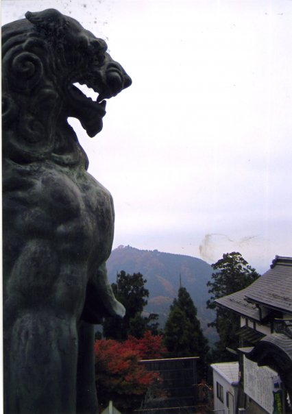 Koma-inu-staty i Oku-tama, Japan.